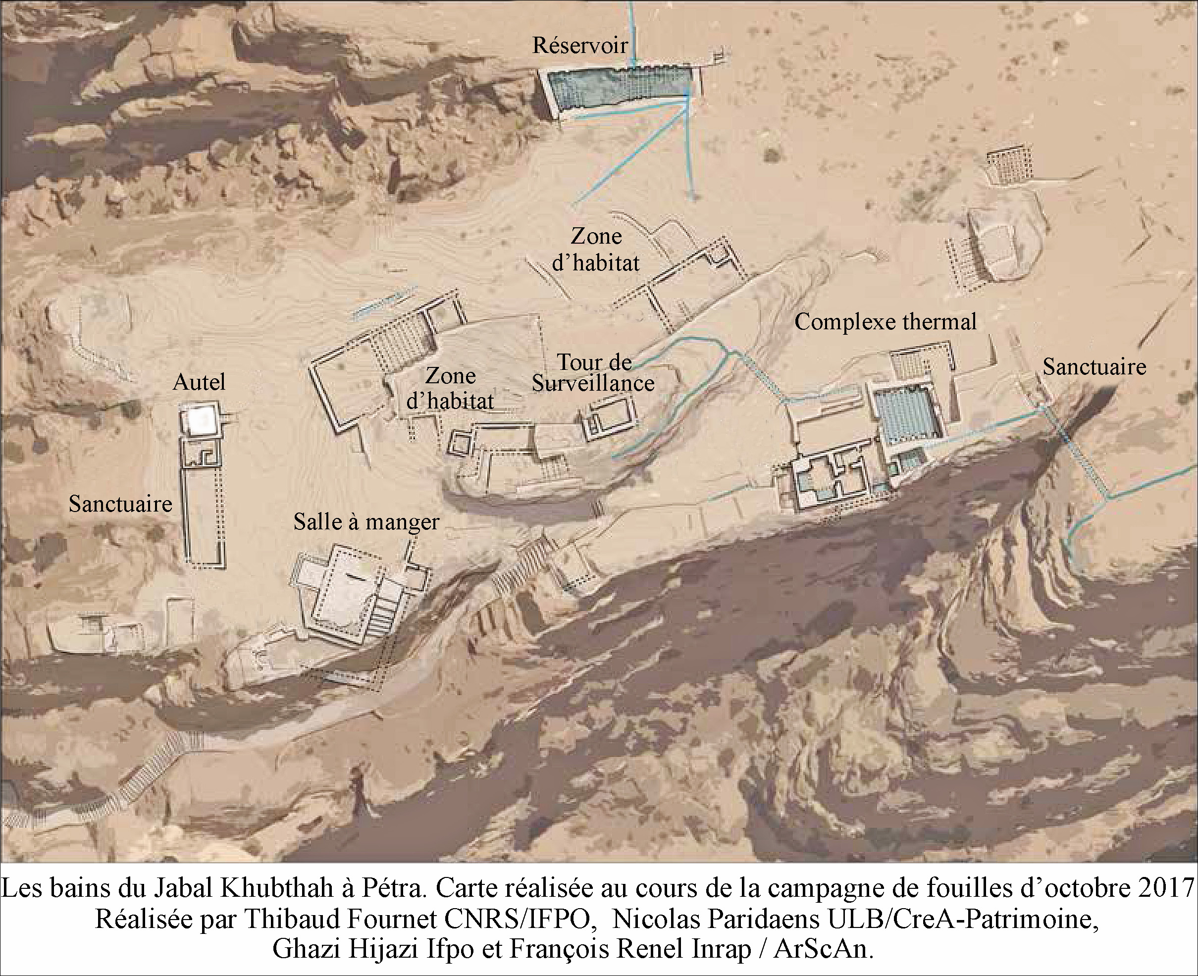 Les bâtiments du djebel Khubthah pendant les fouilles de 2017. Avec l'autorisation de l'archéologue Thibaud Fournet.